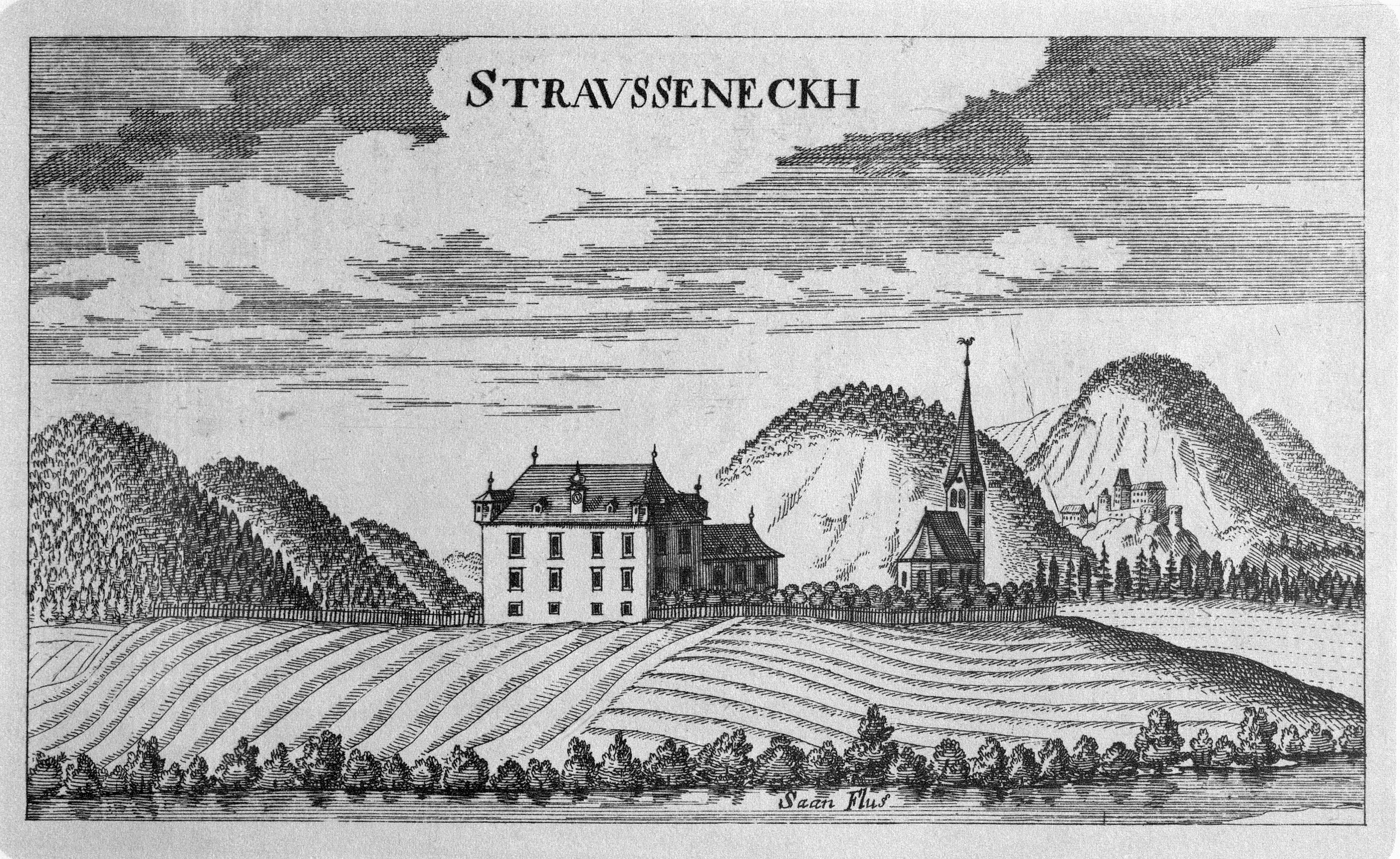 G. M. Vischers Käyserlichen Geographi, Topographia Ducatus Stiriae, Das ist: Eigentliche Delineation / und Abbildung aller Städte / Schlösser / Marcktfleck / Lustgärten / Probsteyen / Stiffter / Clöster und Kirchen / so es sich im Herzogthumb Steyrmarck befinden; Und anjetzo Umb einen billichen Preyß zu finden seynd Bey Johann Bitsch Universitäts Buchhandlern / Auff dem Juden=Platz bey der guldenen Saulen. Graz 1681 Die Nummerierung der Dateien folgt der alphabetischen Reihung der Ortsnamen und entspricht nicht dem Vischer-Register